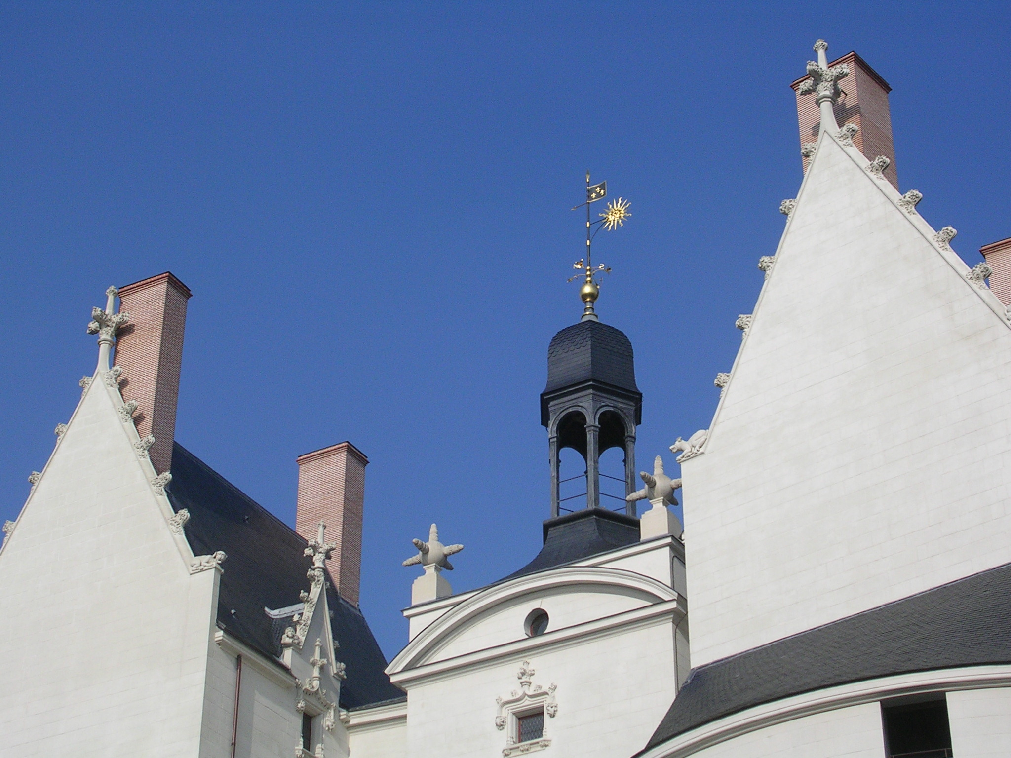 Château des ducs de Bretagne, le campanile. Nantes (France)